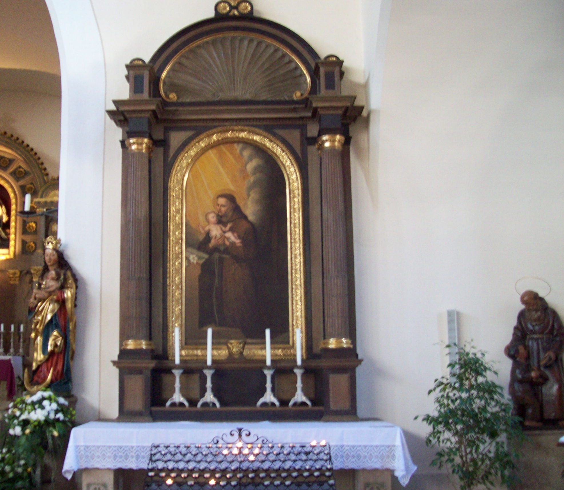 Kapuzinerkirche Aschaffenburg Antoniusaltar von Ludwig Schnitzelbaumer, München 1854/55